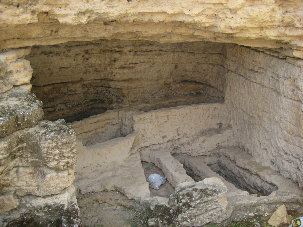 Tumbas romanas